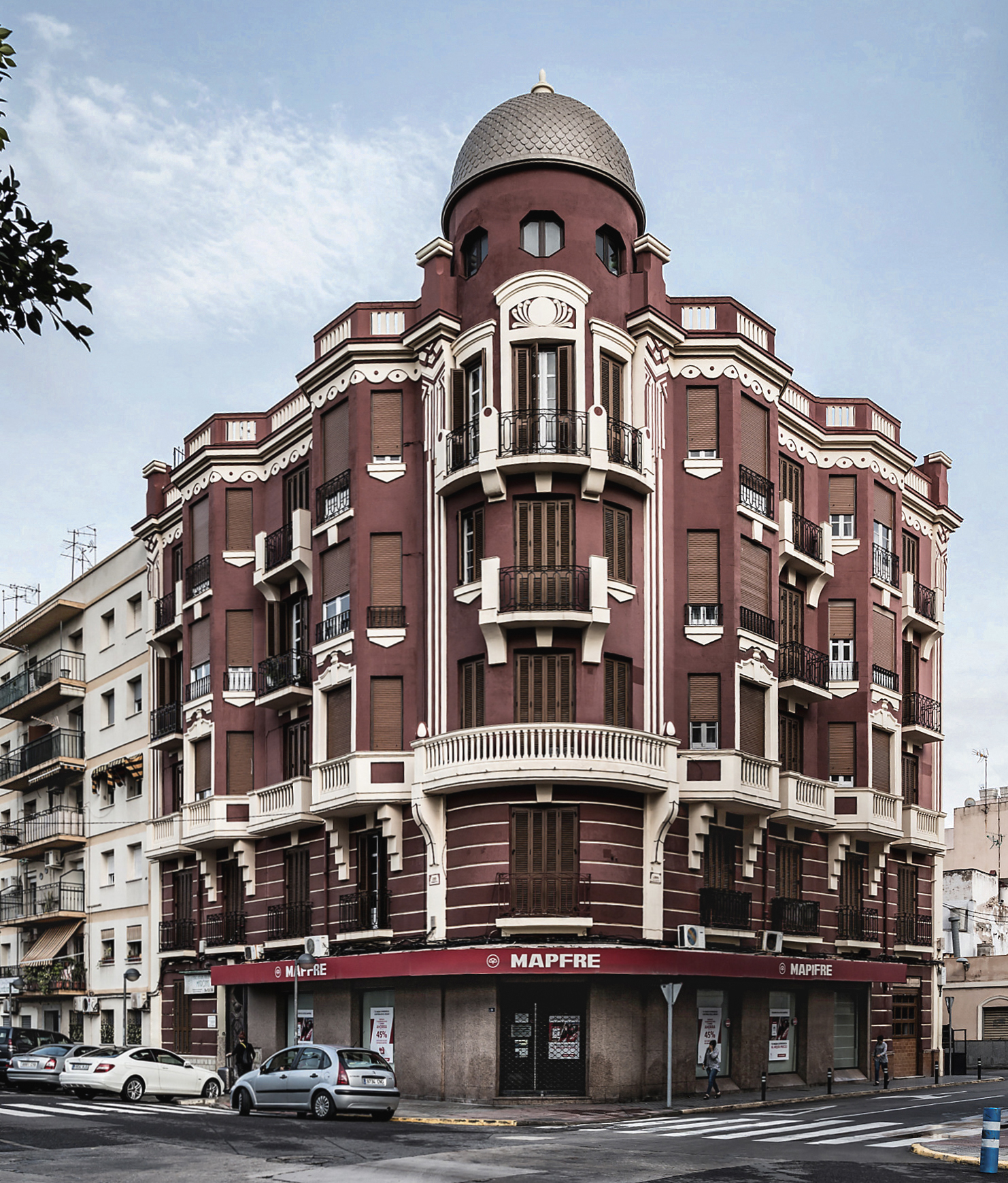 Edificio Art decó. En Avenida de la Democracia, 8 (Melilla). Arquitecto Enrique Nieto y Nieto.